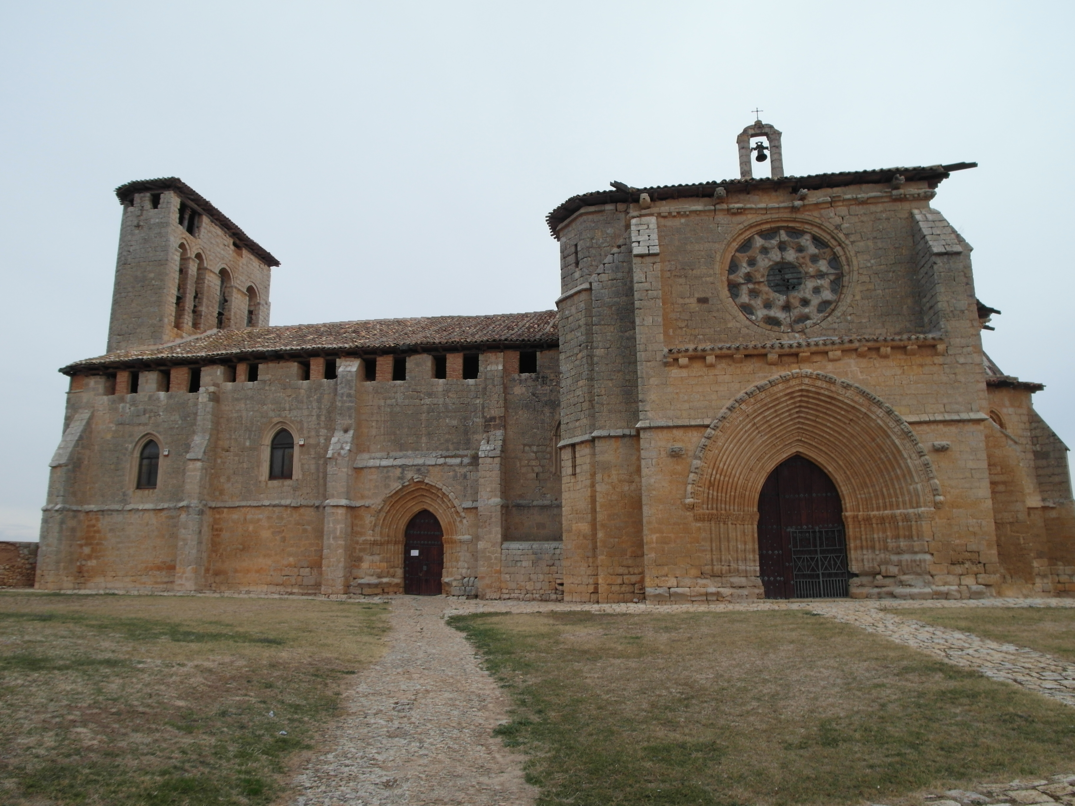 Iglesia de Nuestra Señora de los Reyes, Grijalba, Burgos.